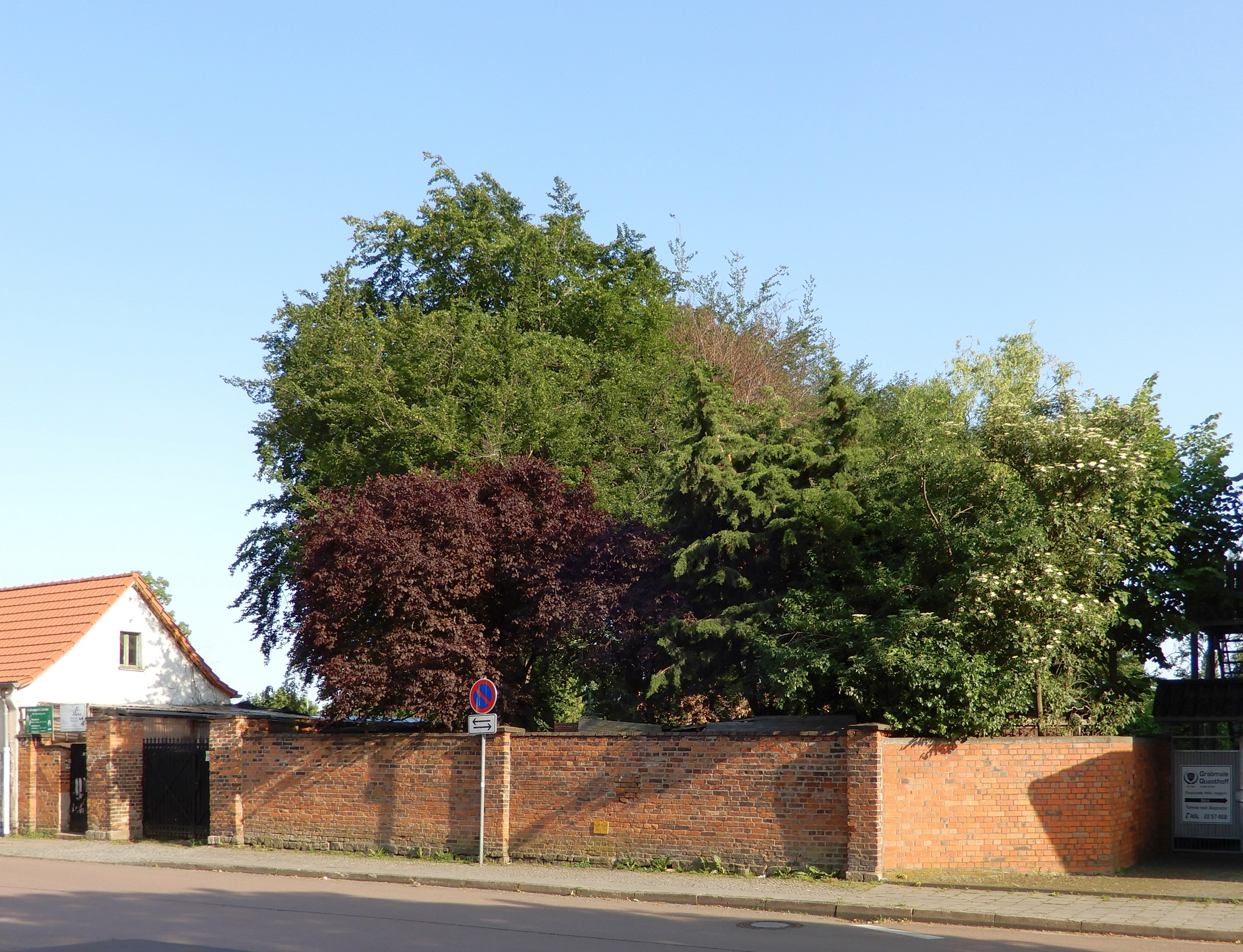 Jüdischer Friedhof in der Schmidtmannstraße in Aschersleben